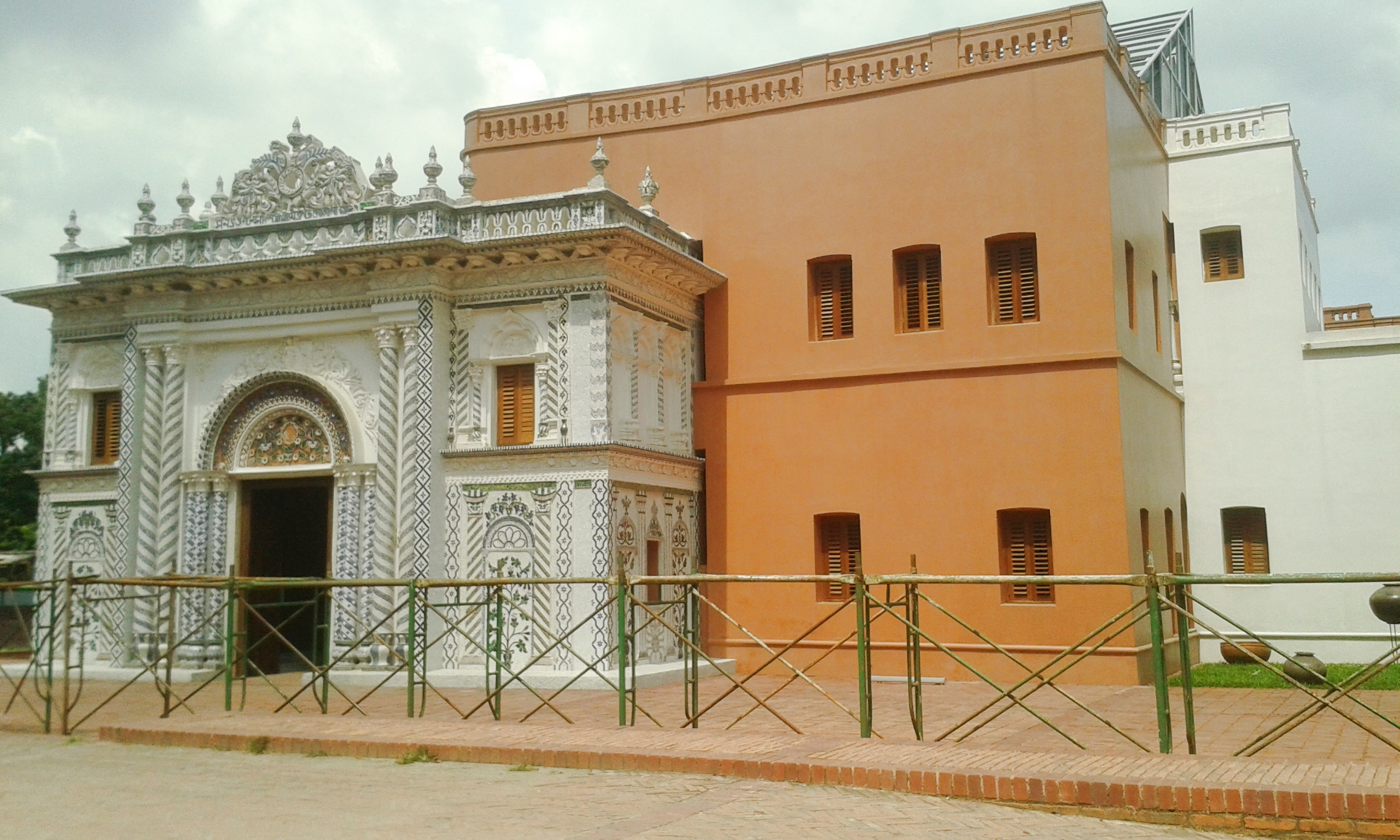 সোনারগাঁ জাদুঘরের পুরাতন ভবন